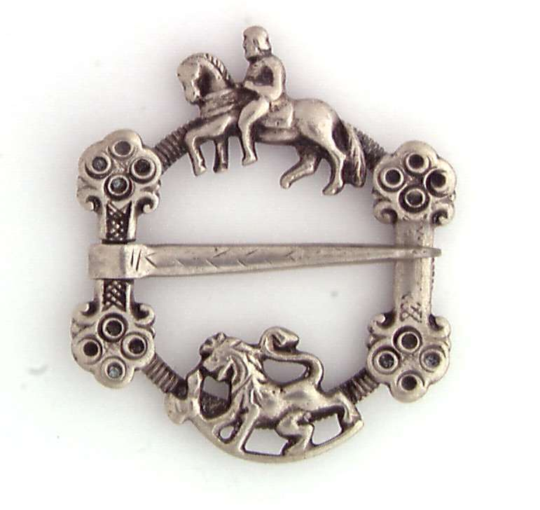 Hornring i sølv ned rytter og løve. Innkjøpt i Bø i Telemark i 1897. Foto Anne-Lise Reinsfelt / Norsk Folkemuseum, NF.1897-1026.